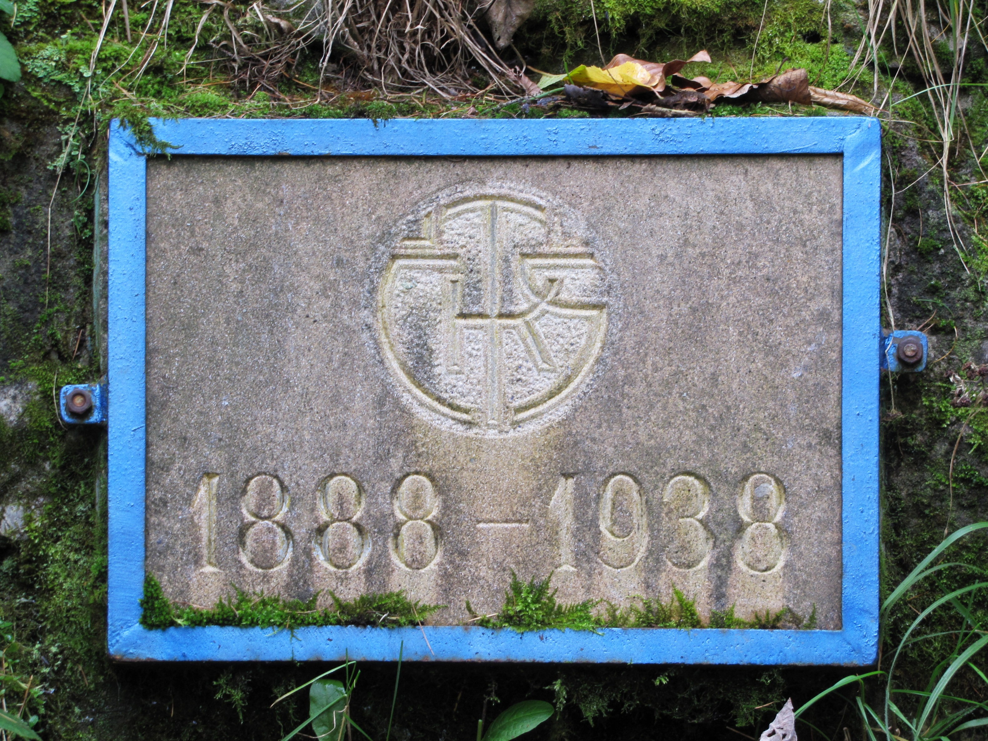 Znak Klubu českých turistů nad pramenem Moštěnky v chatové osadě Zavadilka v katastru Moravan, okres Hodonín, pohoří Chřiby. Znak připomíná 50. výročí založení klubu.